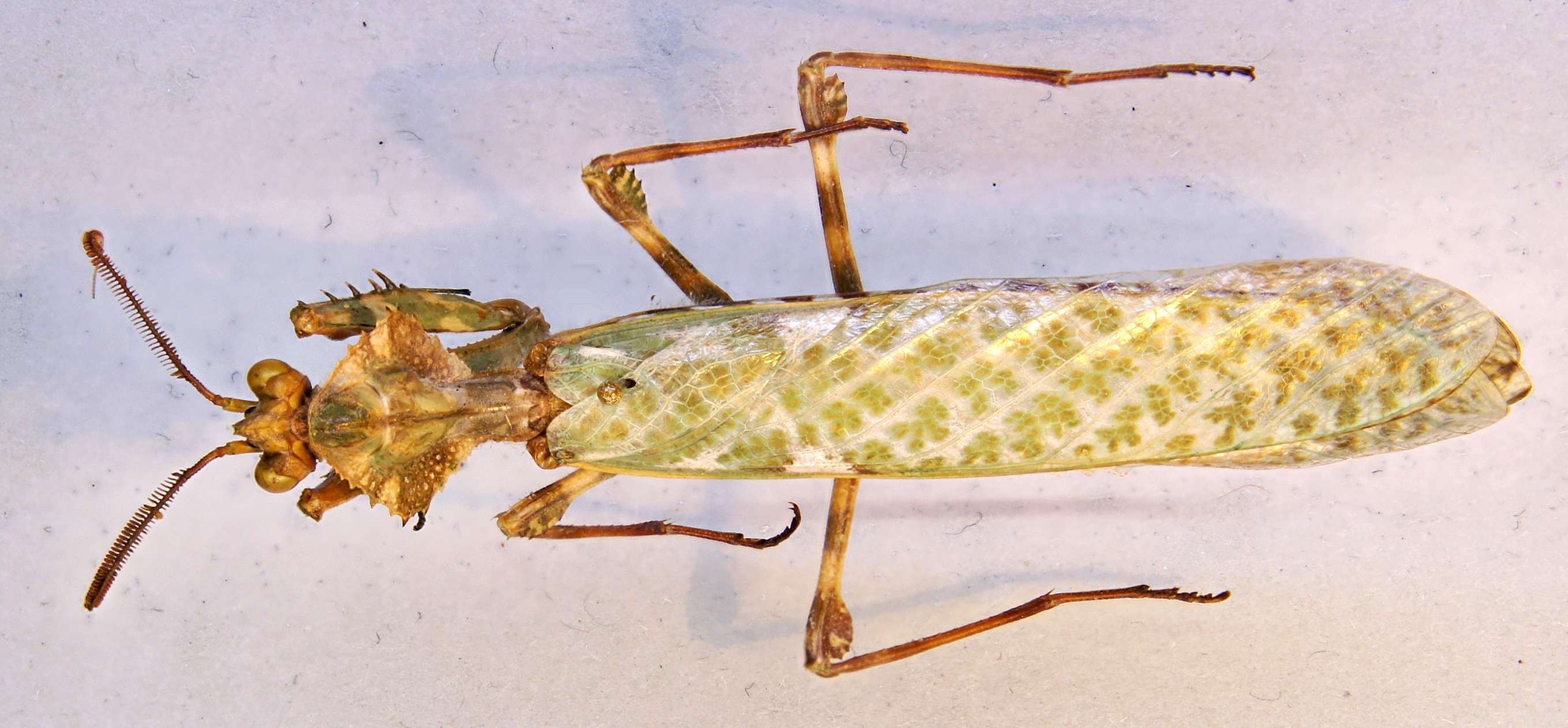 Blepharopsis mendica mendica (Fabricius, 1775)